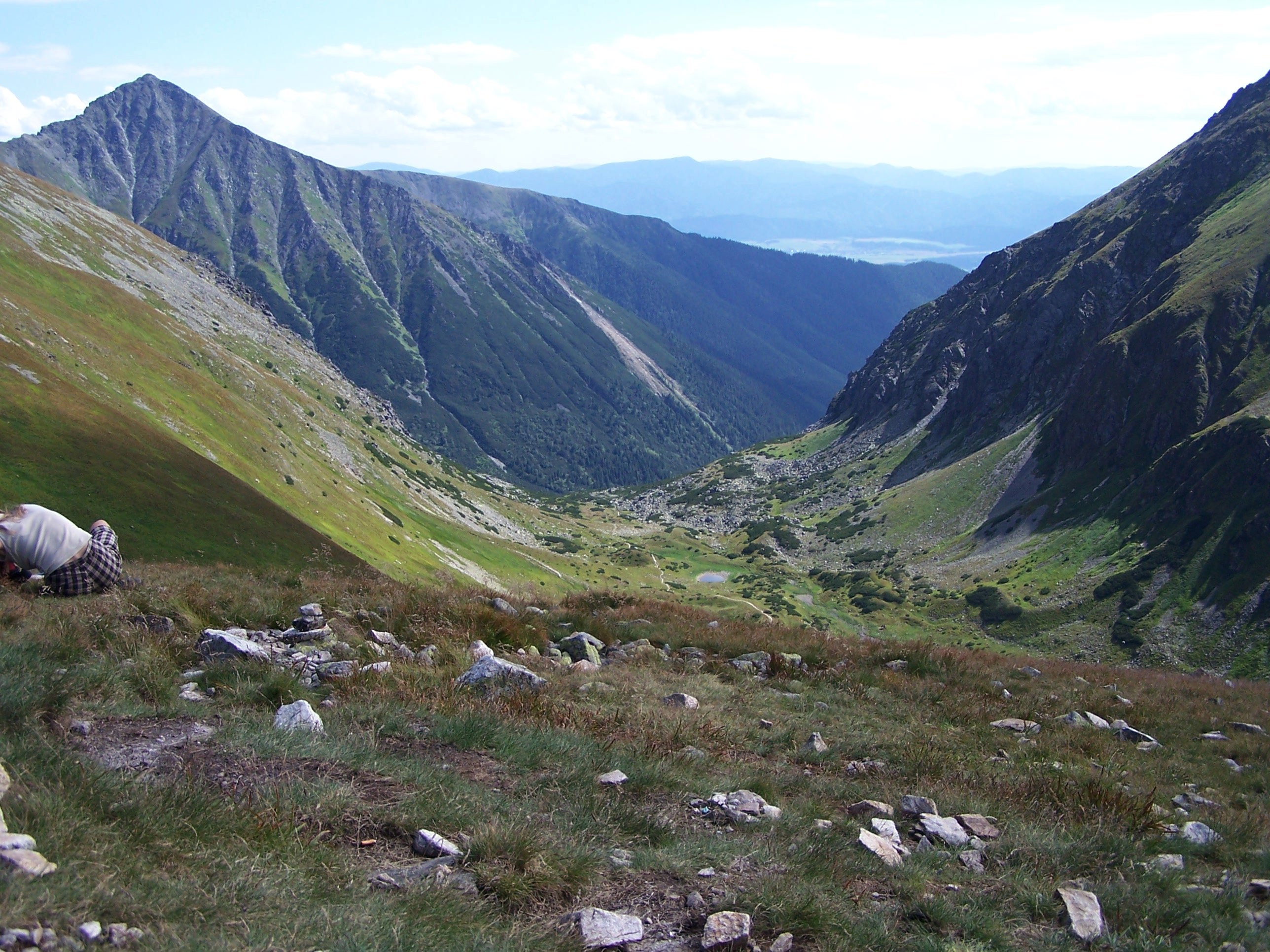 Raczkowa Dolina (Tatra Mountains )